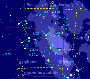 Carte pour la constellation Sagittaire Produite à l'aide du logiciel PP3